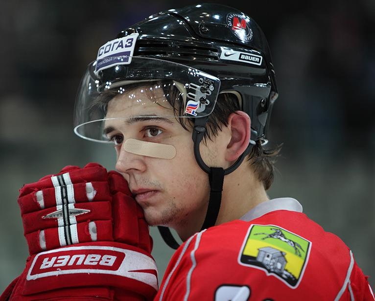 Защитник новокузнецкого «Металлурга» Алексей Гришин во время матча чемпионата КХЛ против пражского «Льва» 30 ноября 2012 года.